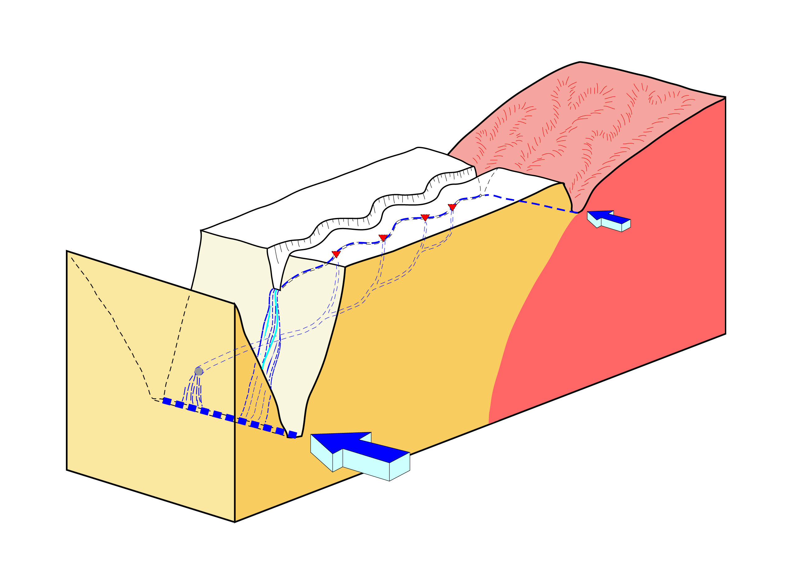 Bloc-diagramme d'un karst recoupé par un canyon.